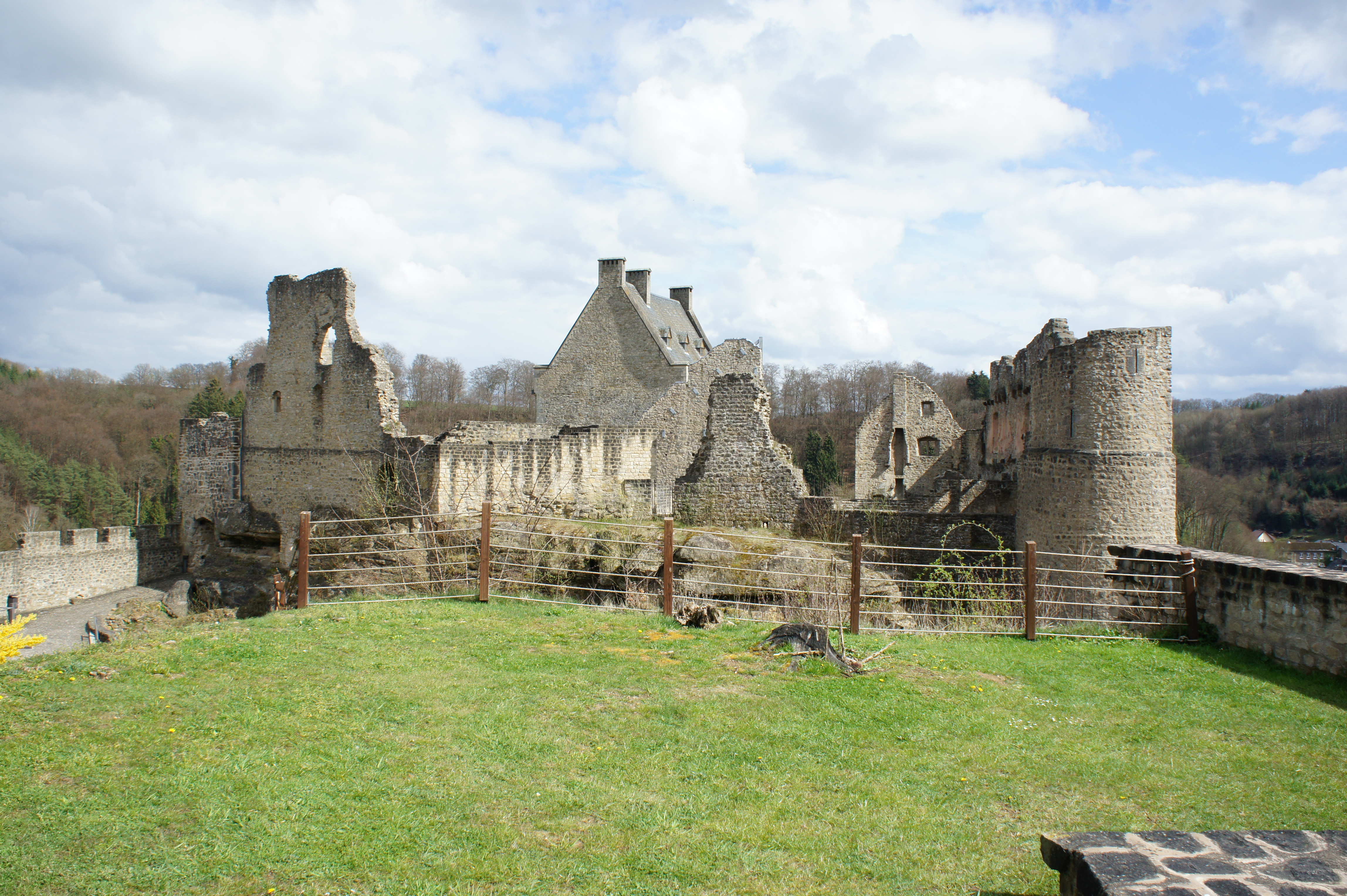 Hauptburg/Kernburg der Burg Fels